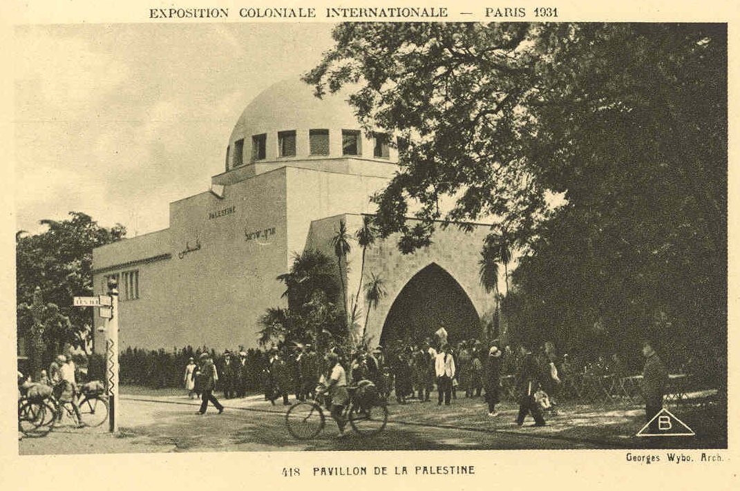 Pavillon de la Palestine à l'Exposition Coloniale de PARIS en 1931